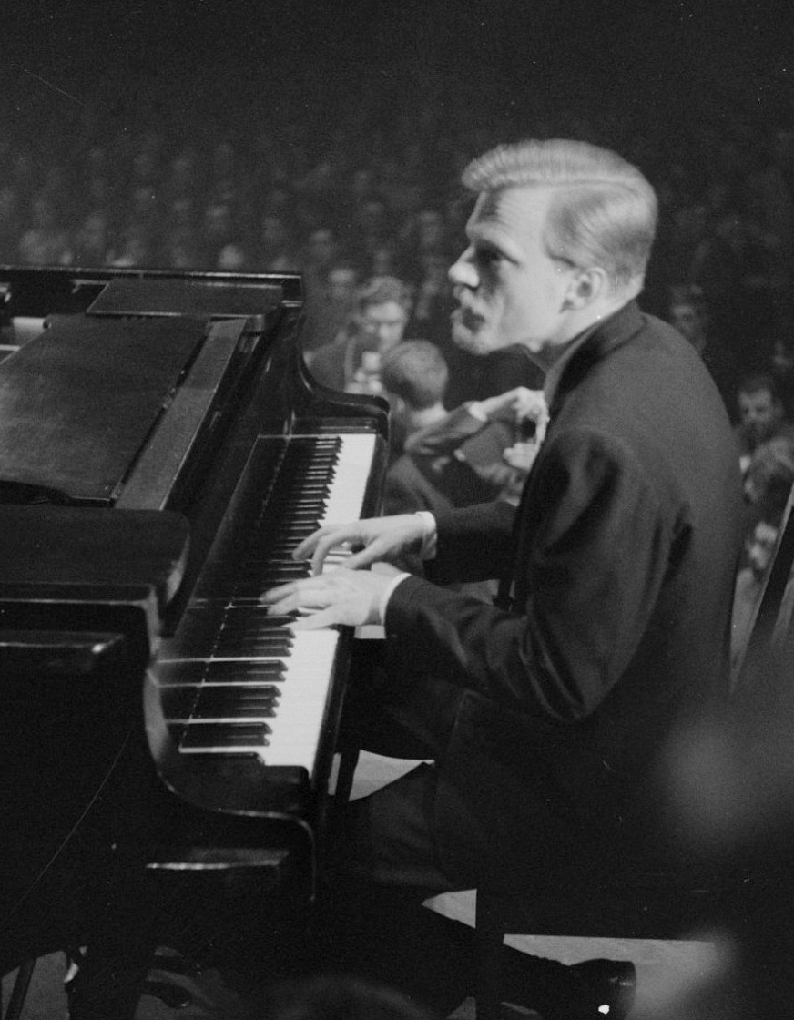 Concert van Jerry Mulligan in het concertgebouw